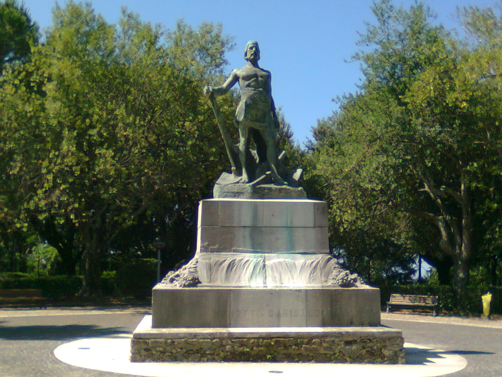 Statua di Bronzo rappresentante Menotti Garibaldi realizzata da Ernesto Biondi